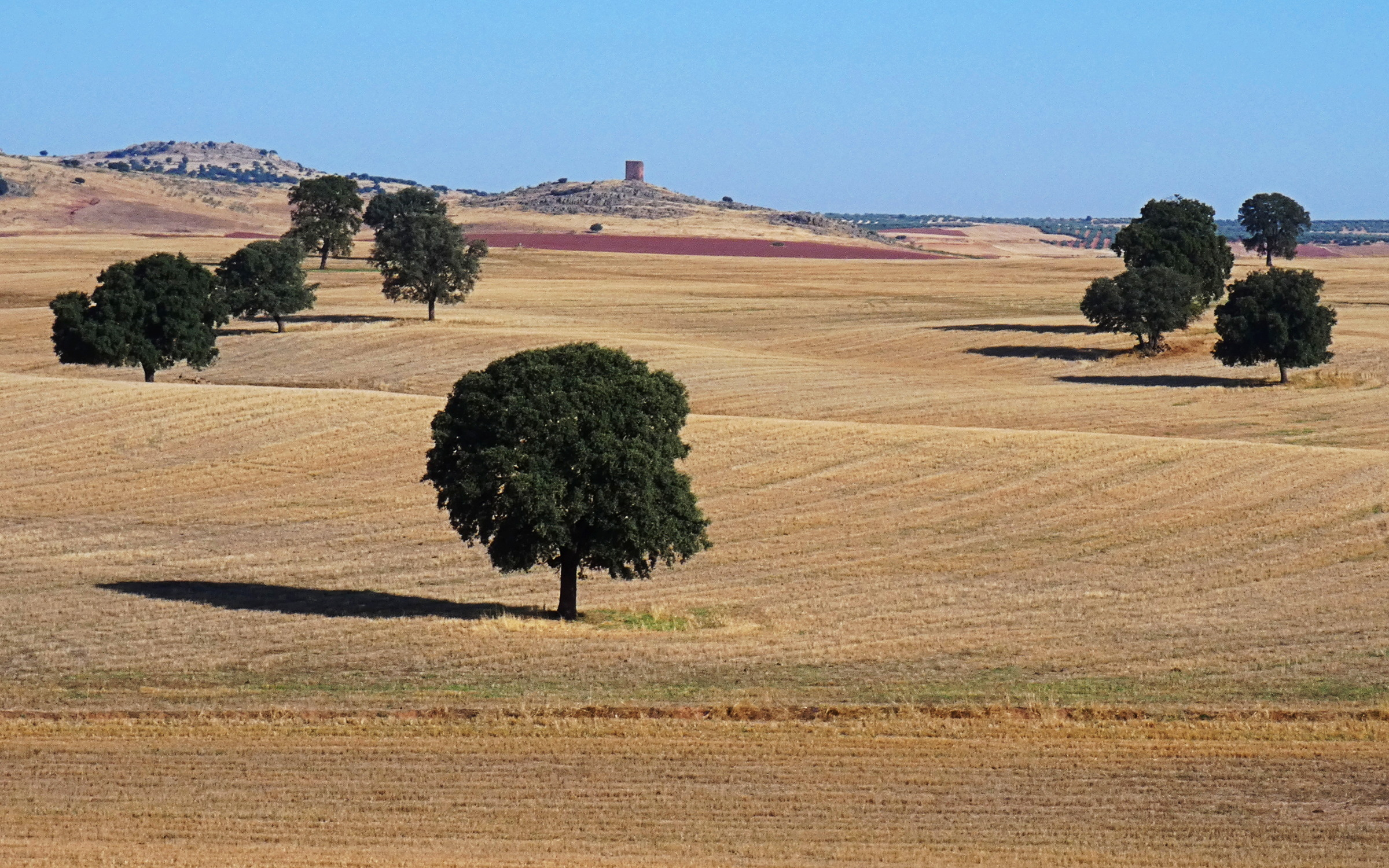 Al fondo asoma la Torre de la Higuera, construida en el siglo XIII. Se utilizaba para vigilancia en tiempos revueltos. Se encuentra en el término municipal de Villamanrique, pero muy cerca de otro pueblo llamado Torre de Juan Abad.